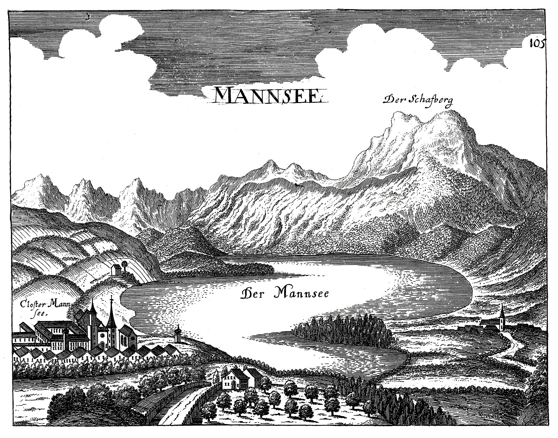 Ansicht des Mondsees (damals Mannsee). Links am Rand ist das Kloster Mondsee zu sehen und rechts der Schafberg. Kupferstich von Georg Matthäus Vischer